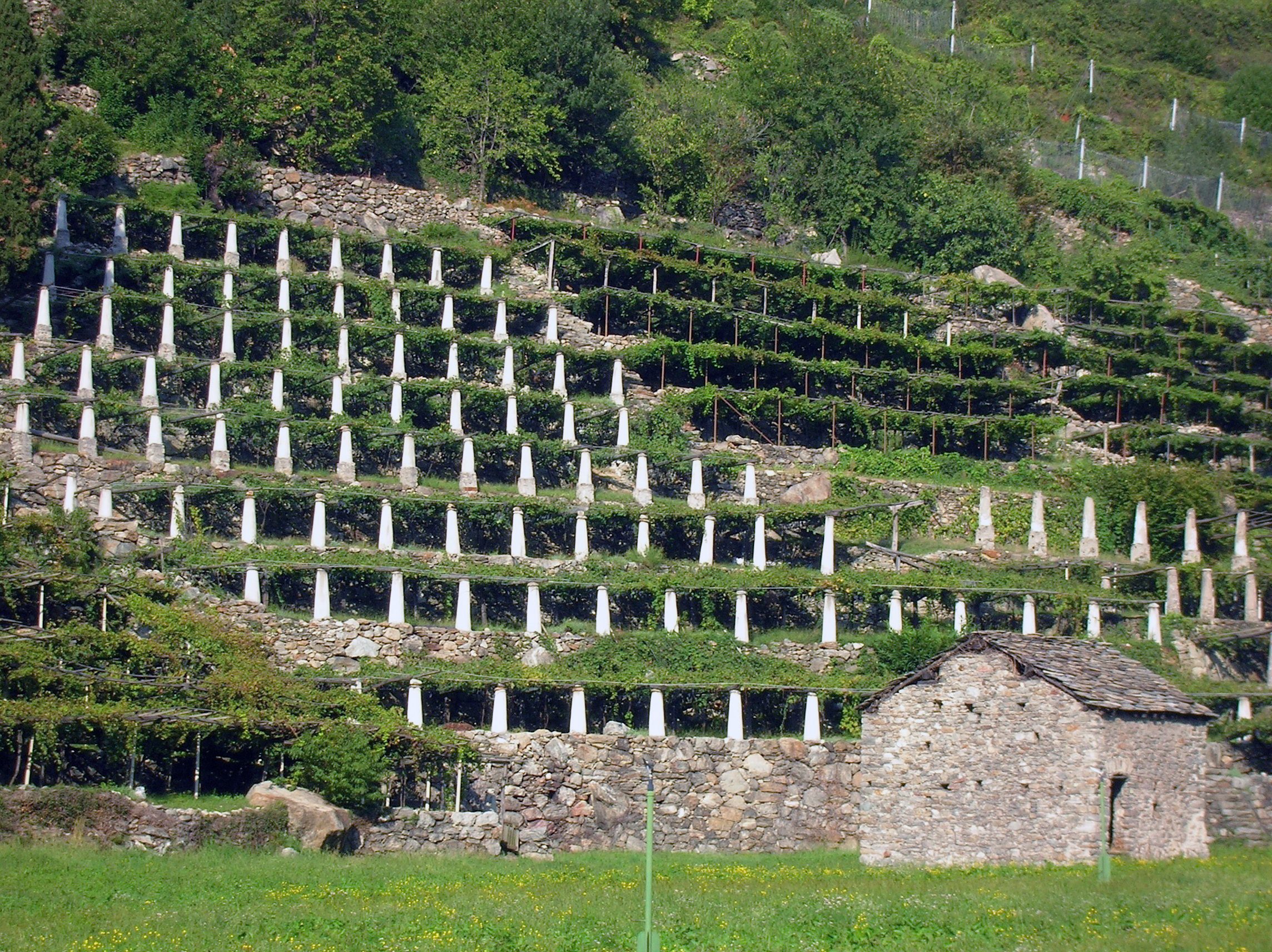 I secolari terrazzamenti della vite, Donnas, Valle d'Aosta, Italia. This is a photo of a monument which is part of cultural heritage of Italy.